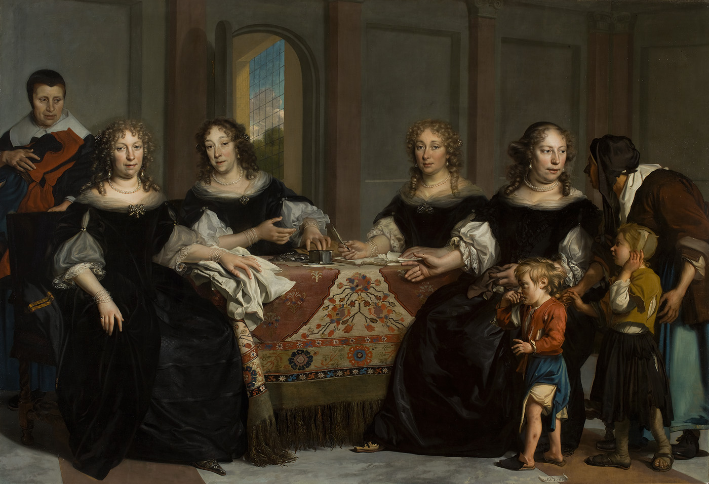 schilderij; wezenzorg; regenten; Regentessenkamer; Burgerweeshuis; portret; groepsportret; regentenstuk; burgerwezen; regenten; Blaeuw, Debora; Munter, Maria; Heyningen, Catharina van; Merct, Maria van der